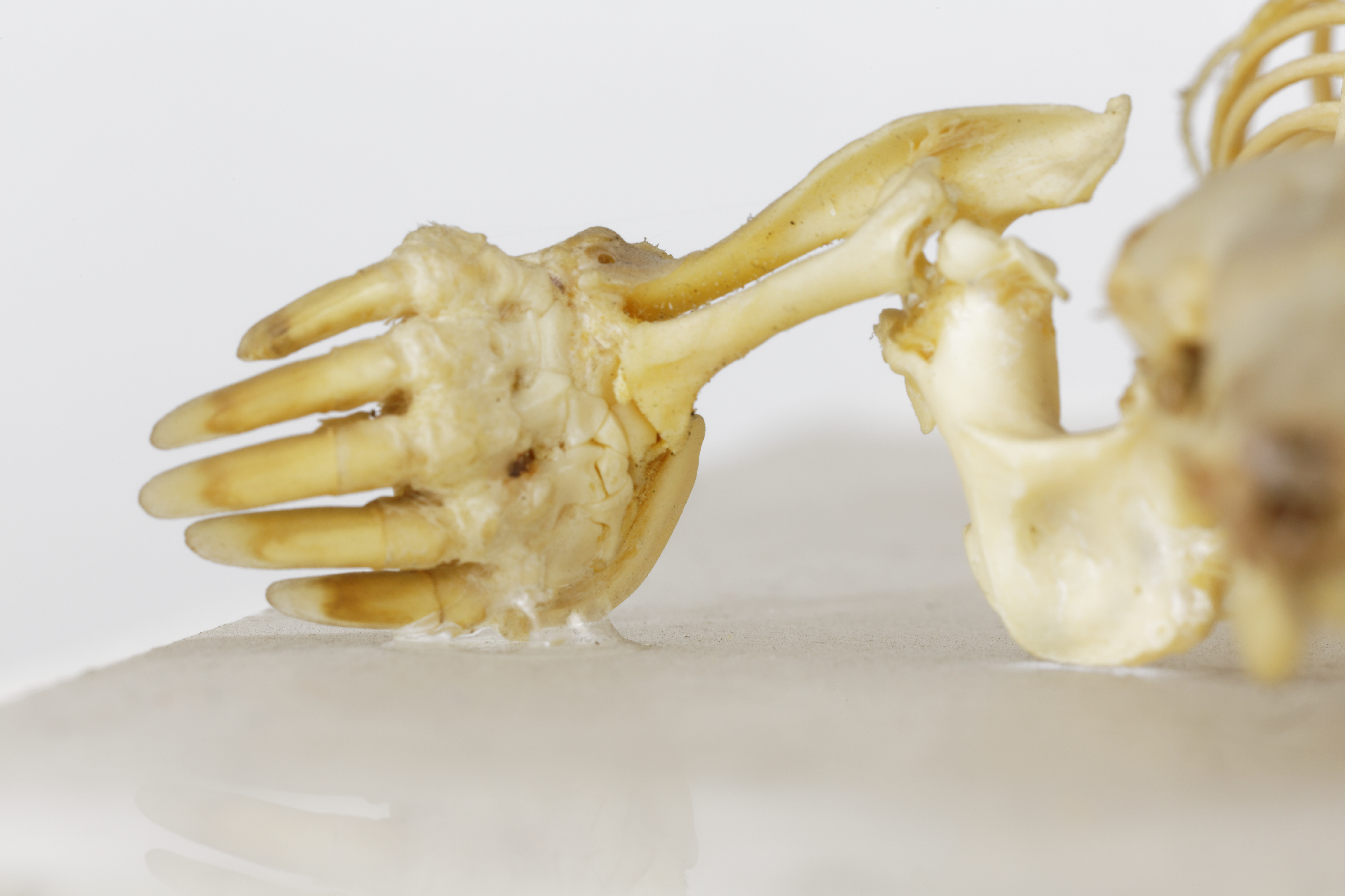 Un squelette de taupe d'Europe - Talpa europaea - de la collection de l'Université Pierre-et-Marie-Curie à Paris.